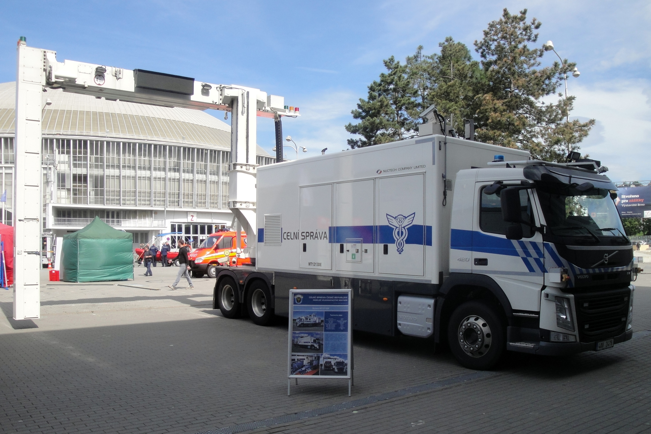 Volvo FM 420 Nuctech MT1213DE, IDET/PYROS/ISET 2019, Brünn